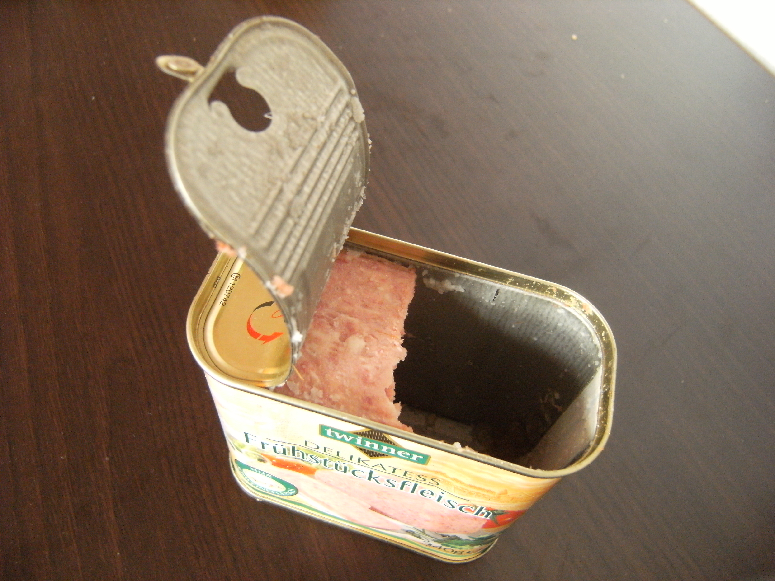 Frühstücksfleisch 2009